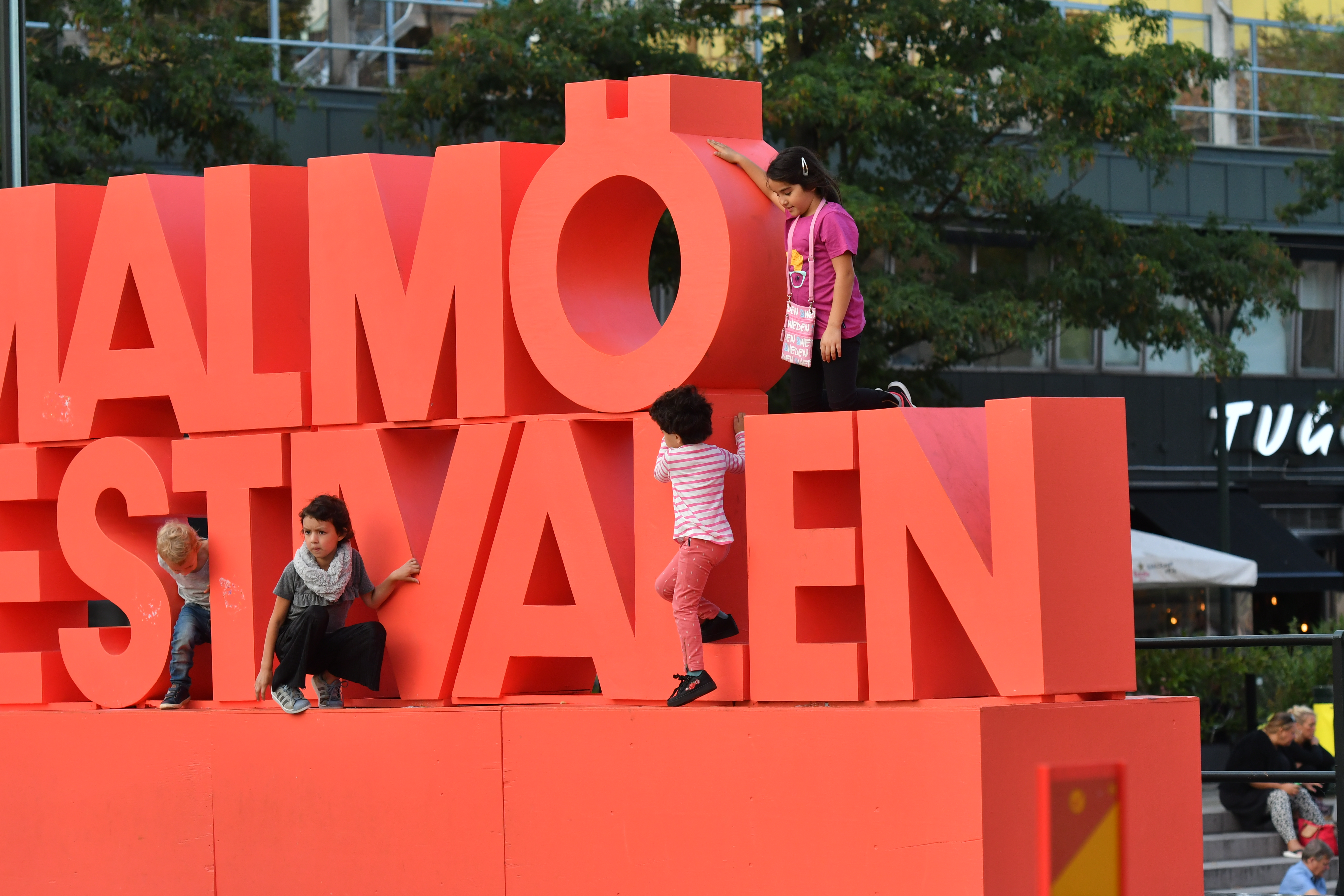 Folkvimmel på Malmöfestivalen.